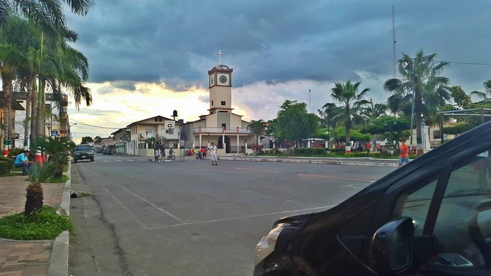 Parque central de Palenque